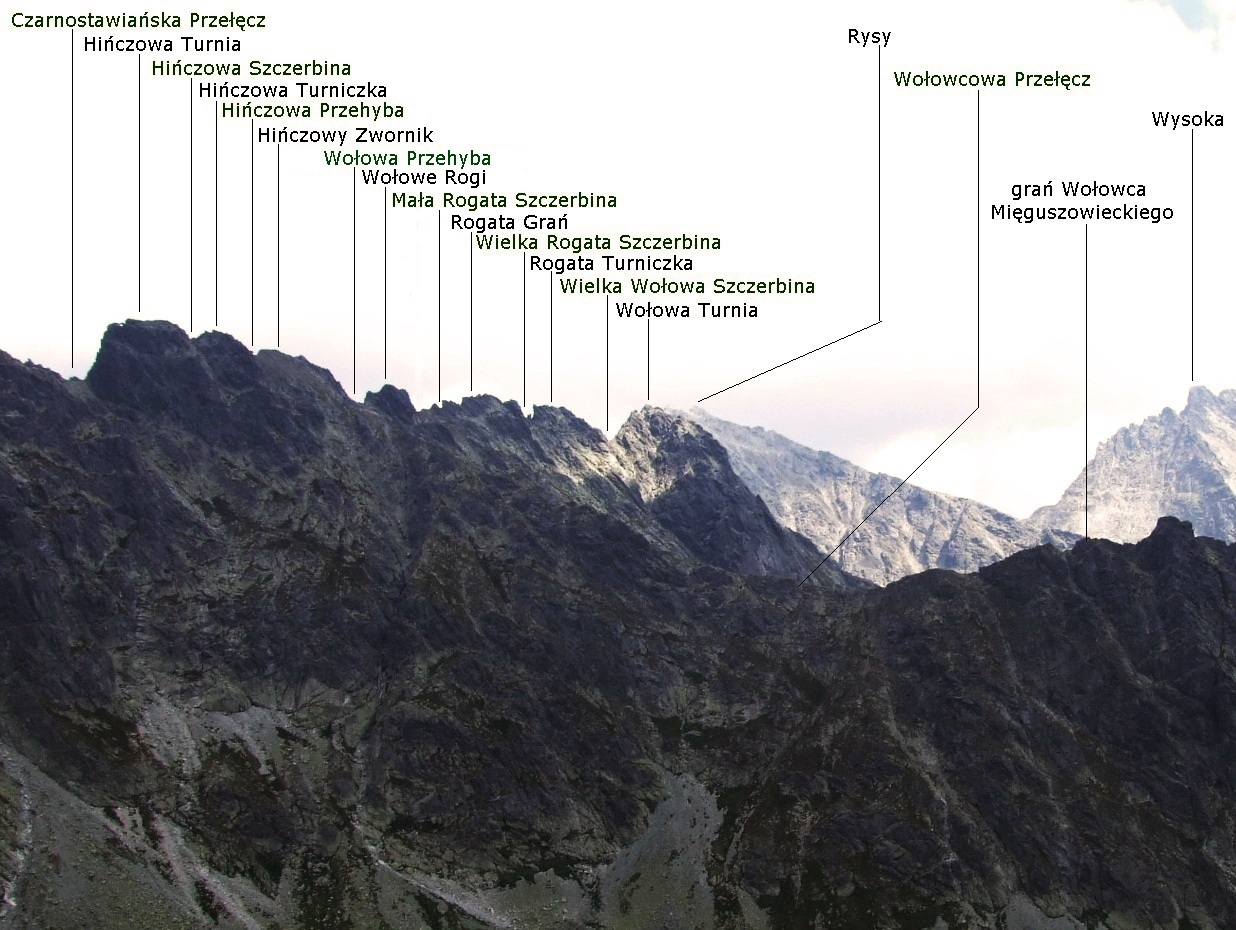 Wołowy Grzbiet. Widok z Wyżnej Koprowej Przełęczy